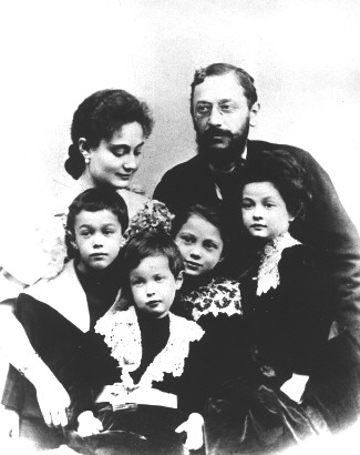 Weiss Manfréd és családja. Felesége, Wohl Alice és gyermekeik: Elza, Marianne, Jenő, Alfonz.